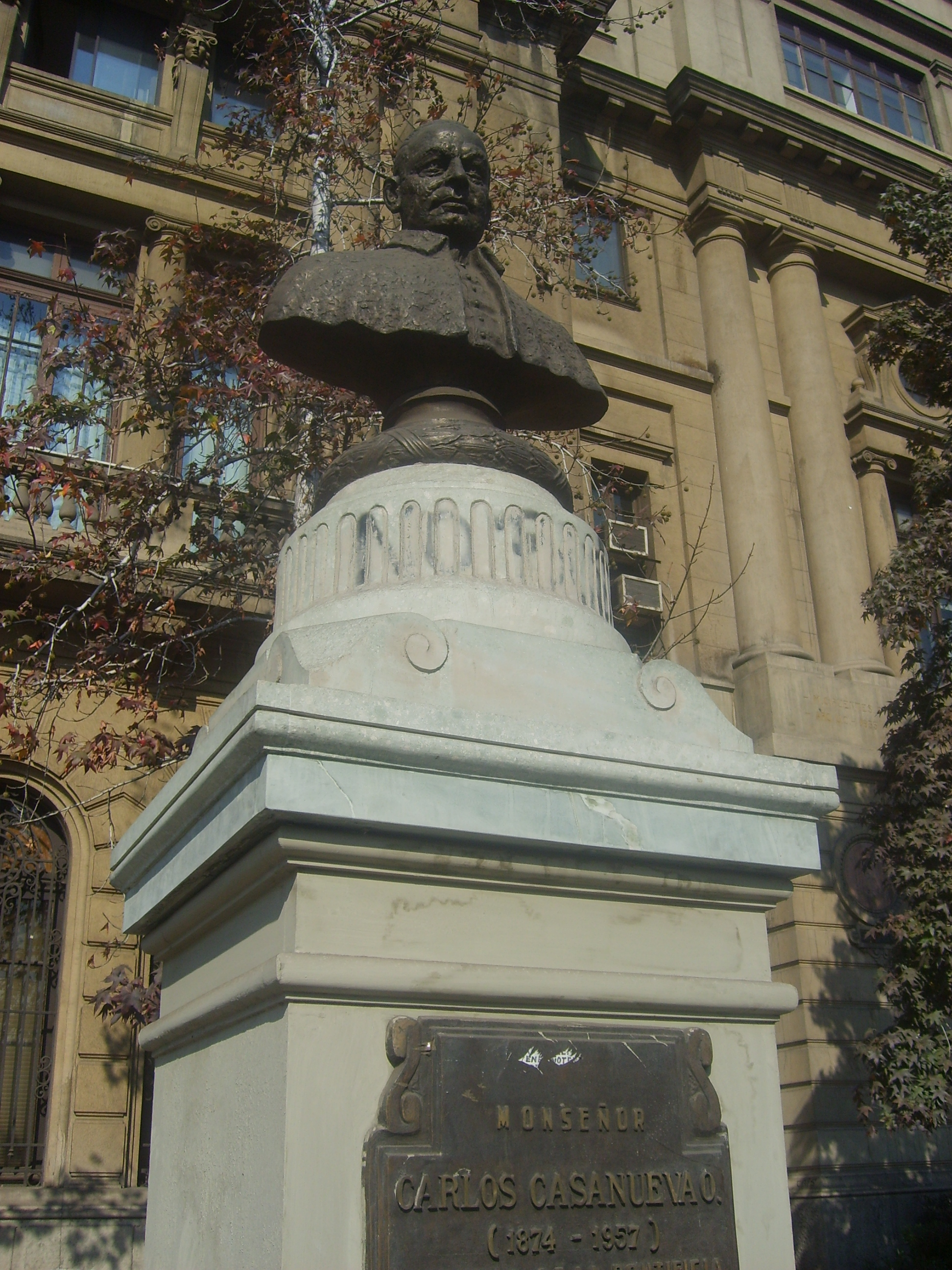 Fotografía del busto existente en el frontis de la Casa Central de la PUC.